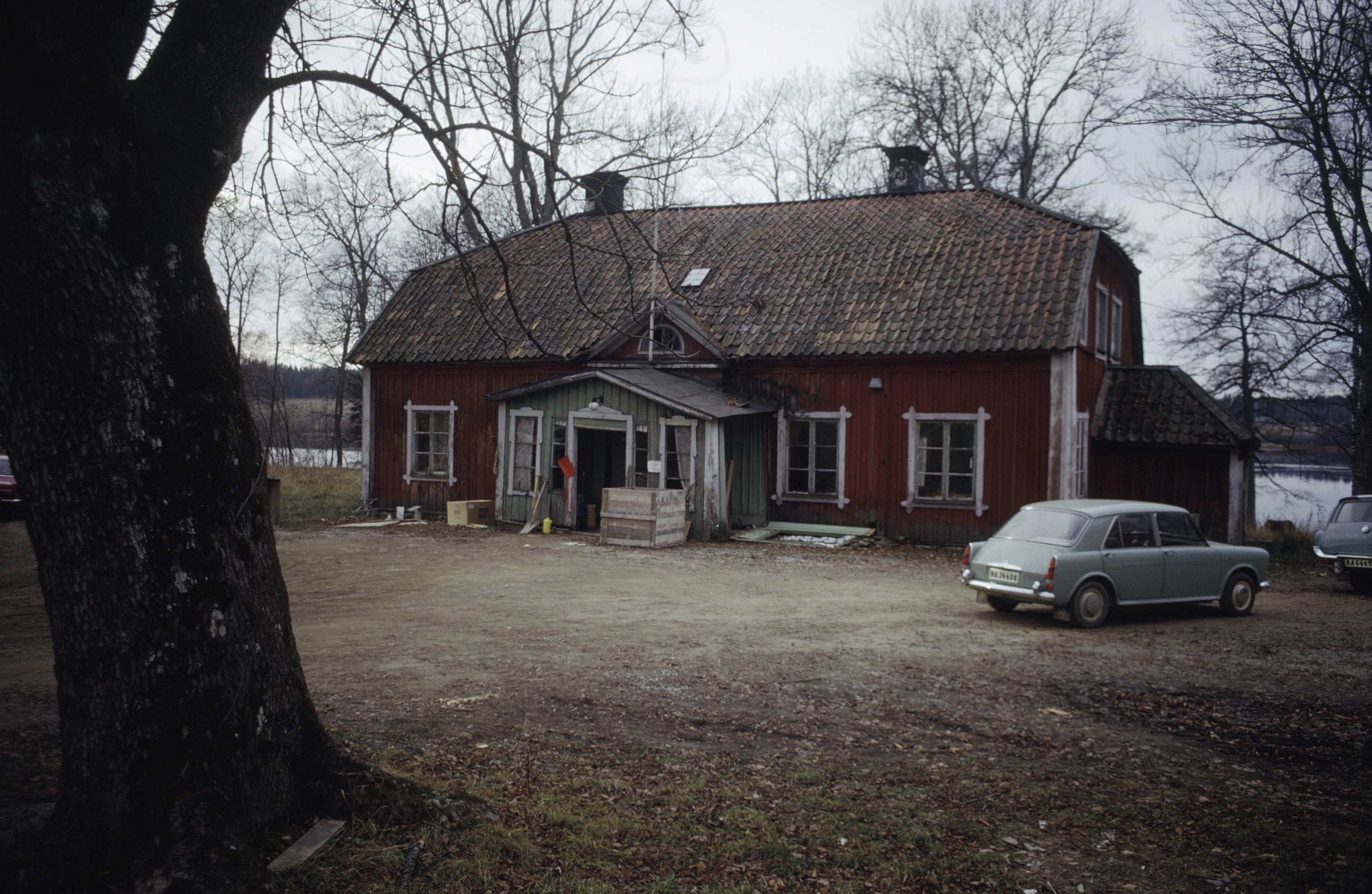 Näsby gård i Botkyrka kommun. Byggnaden riven, på platsen ligger Anstalten Asptuna